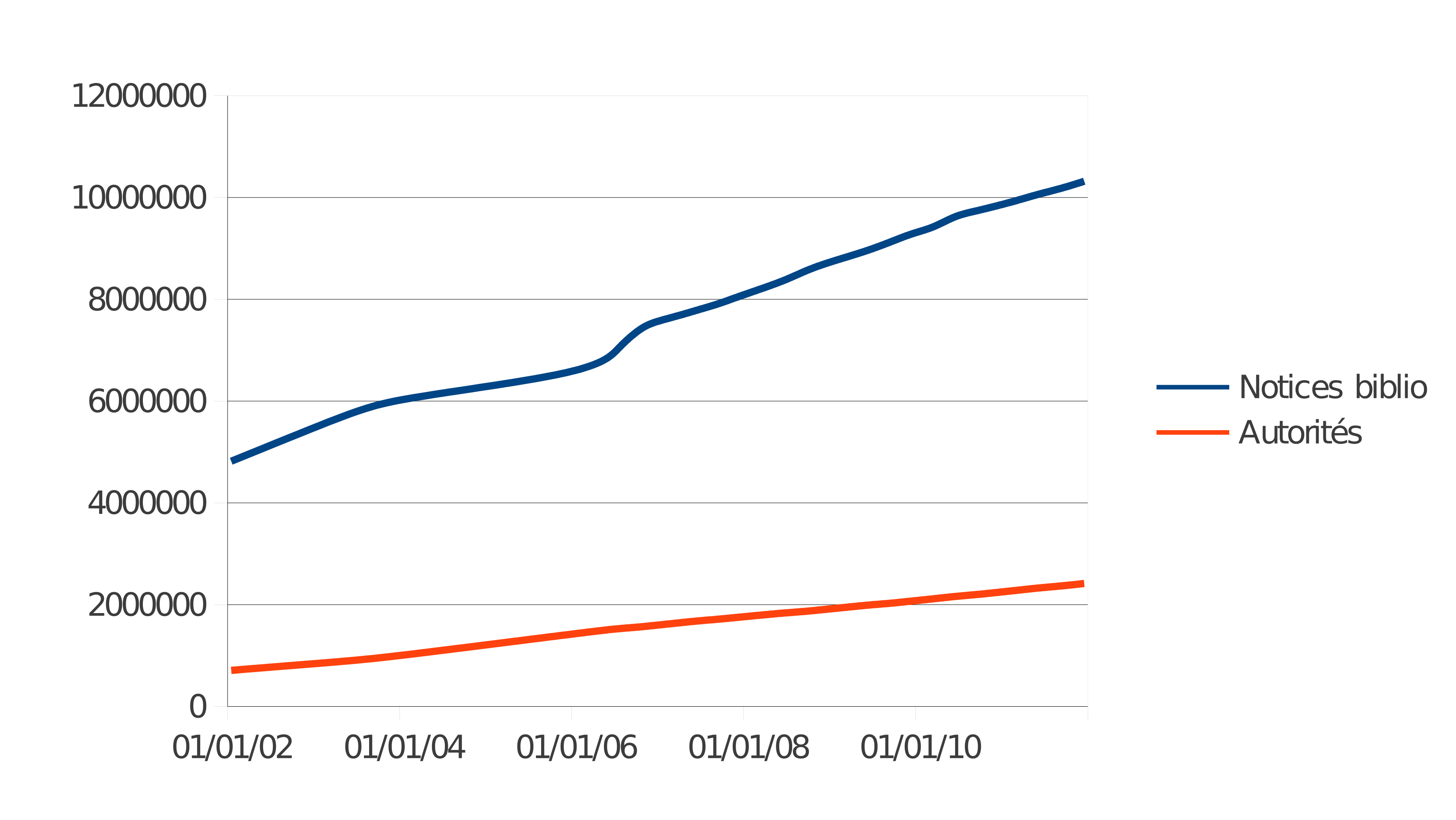 Version PNG du fichier File:Évolution base de données sudoc.svg.